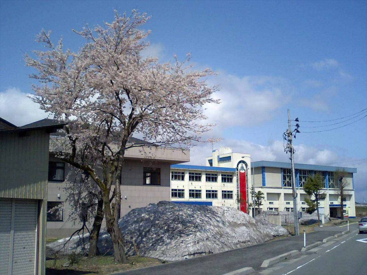 この画像は2006年5月3日投稿者によって、新潟県長岡市西川口（新潟県道557号西川口和南津線車道上）にて撮影された桜の花の木と川口町立川口小学校（現在の長岡市立川口小学校）の写真。